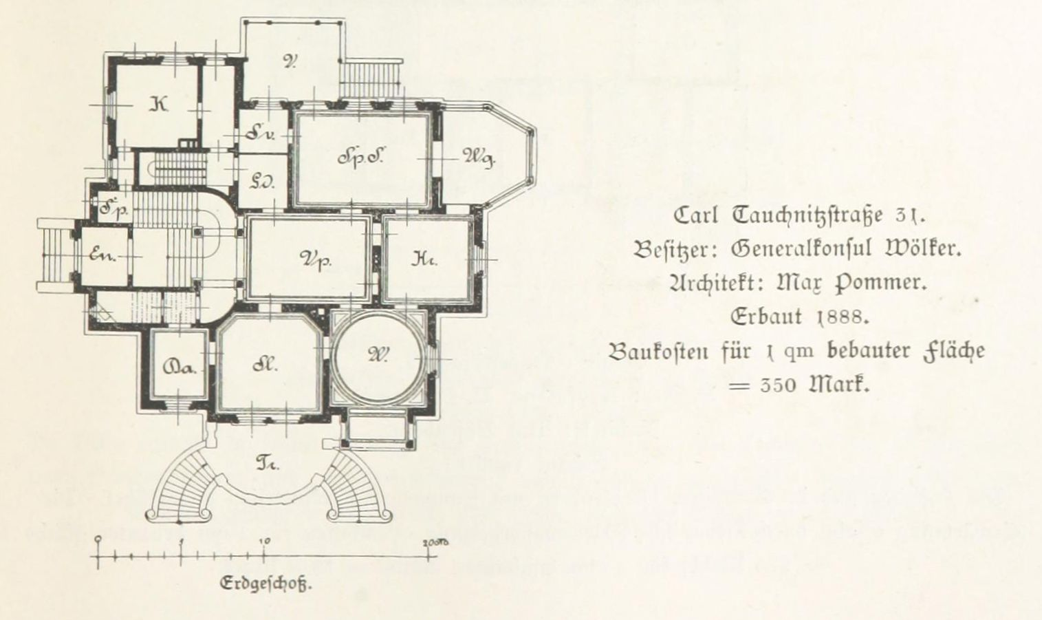 Villa Wölker in der Leipziger Karl-Tauchnitz-Straße 15 (alte Hausnummer 31). Erbaut 1888 nach Plänen von Max Pommer für Generalkonsul Wölker Grundriss